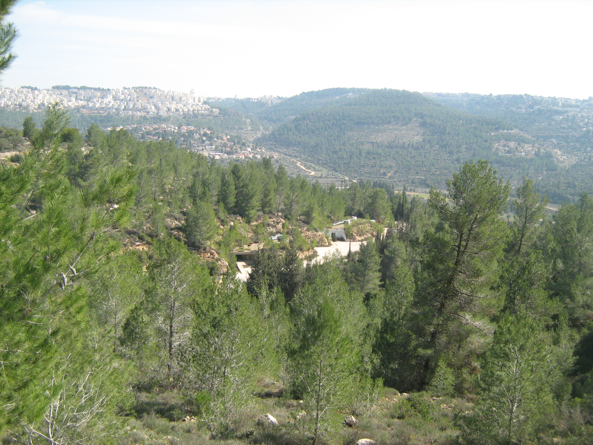 מראה בהר חרת